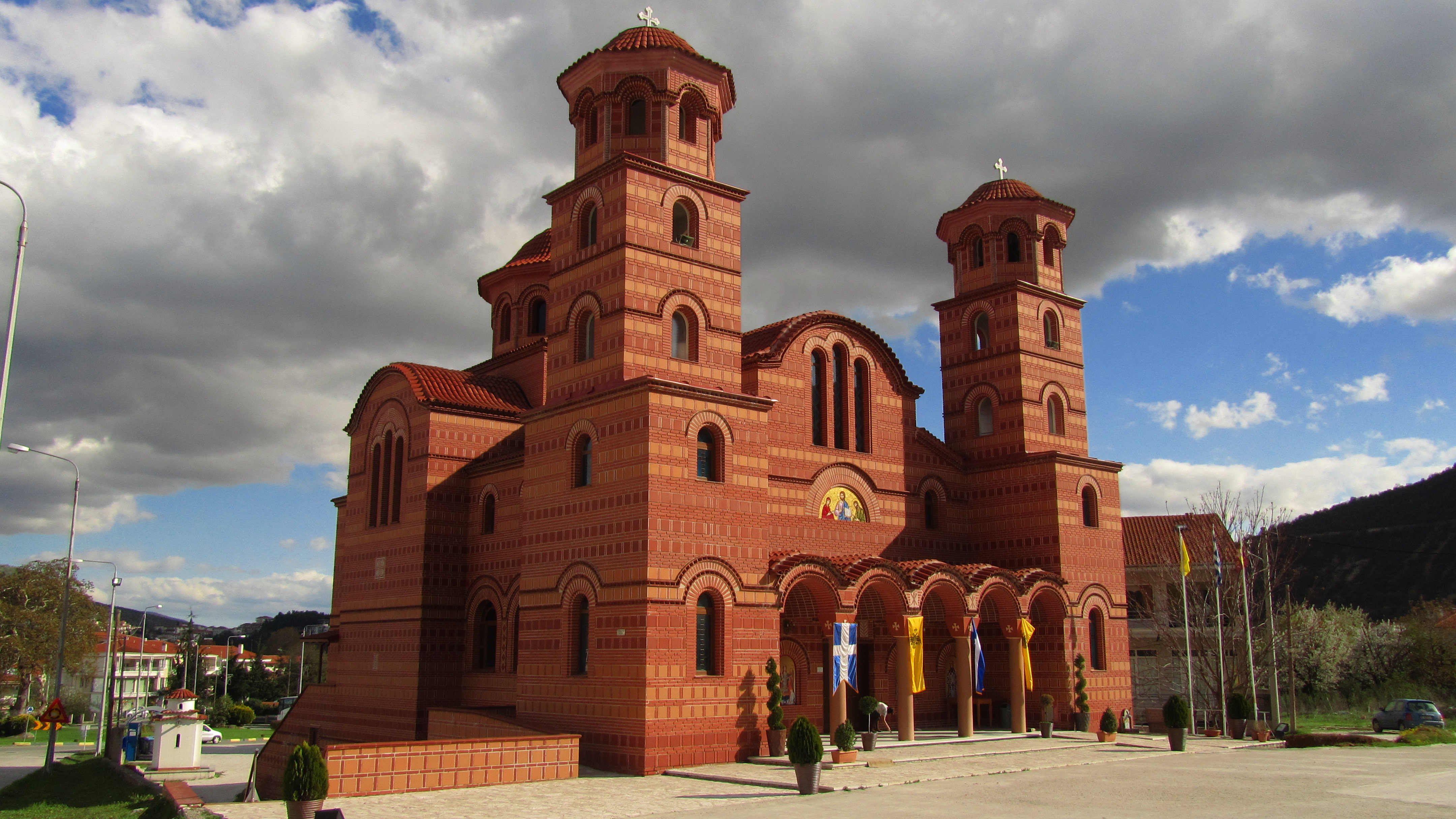 KASTORIA-αγιος νικανορας